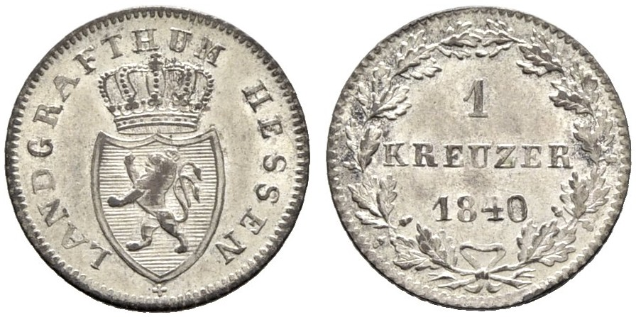 Münze 1 Kreuzer der Landgrafschaft Hessen-Homburg. Gezeigt wird Landgraf Philipp.